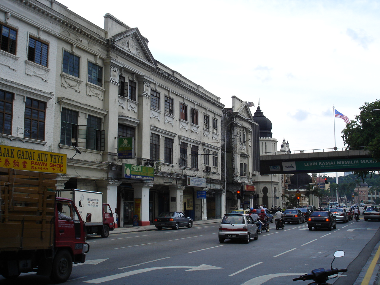 Jalan Tuanku Abdul Rahman facing Dataran Merdeka (Merdeka Square).